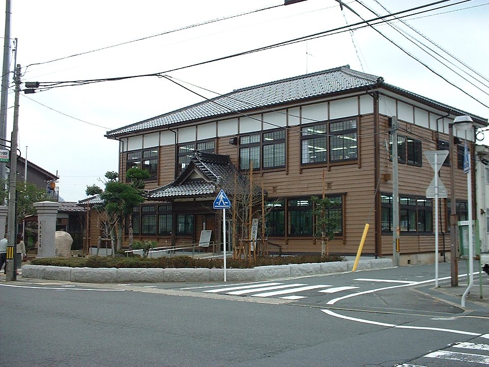 久美浜町役場